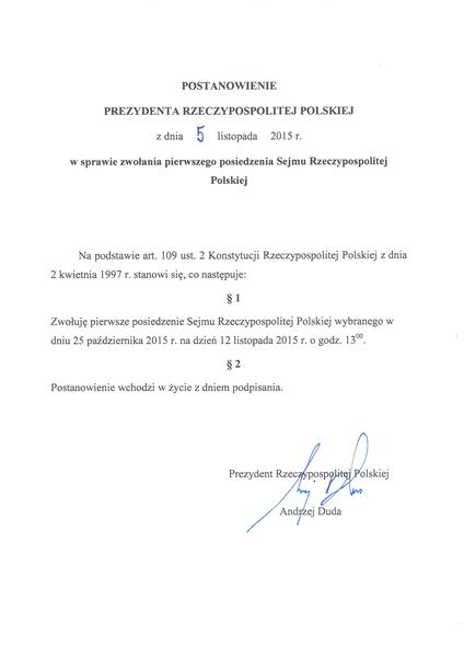 Postanowienie Prezydenta Rzeczyspolitej Polskiej o zwołaniu pierwszego posiedzenia Sejmu VIII kadencji